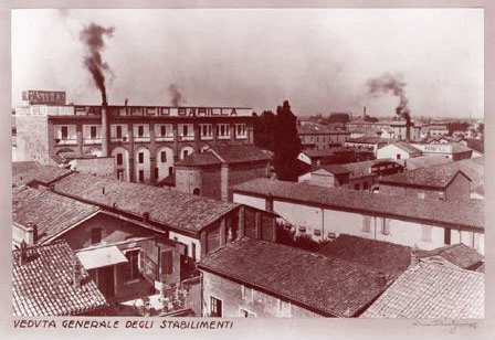 Veduta degli stabilimenti Barilla, Parma 1927 (Archivio storico Barilla, Fondo Barilla)